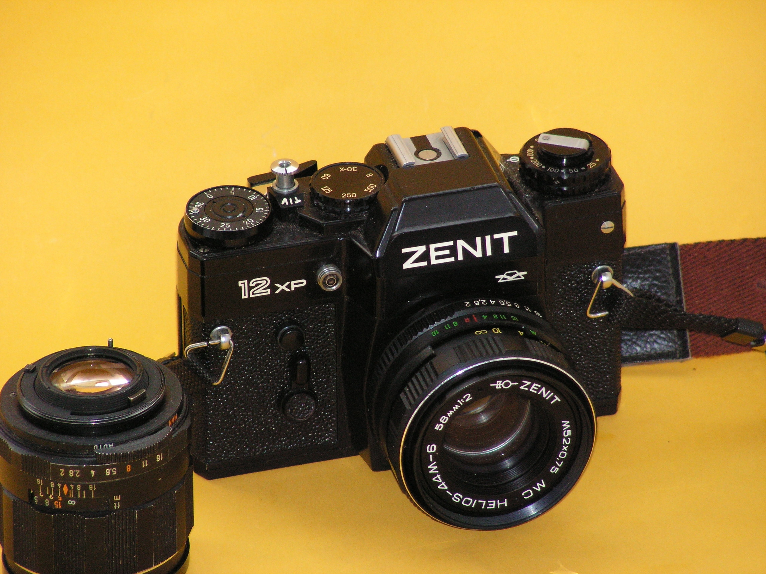 Zenit 12 XP